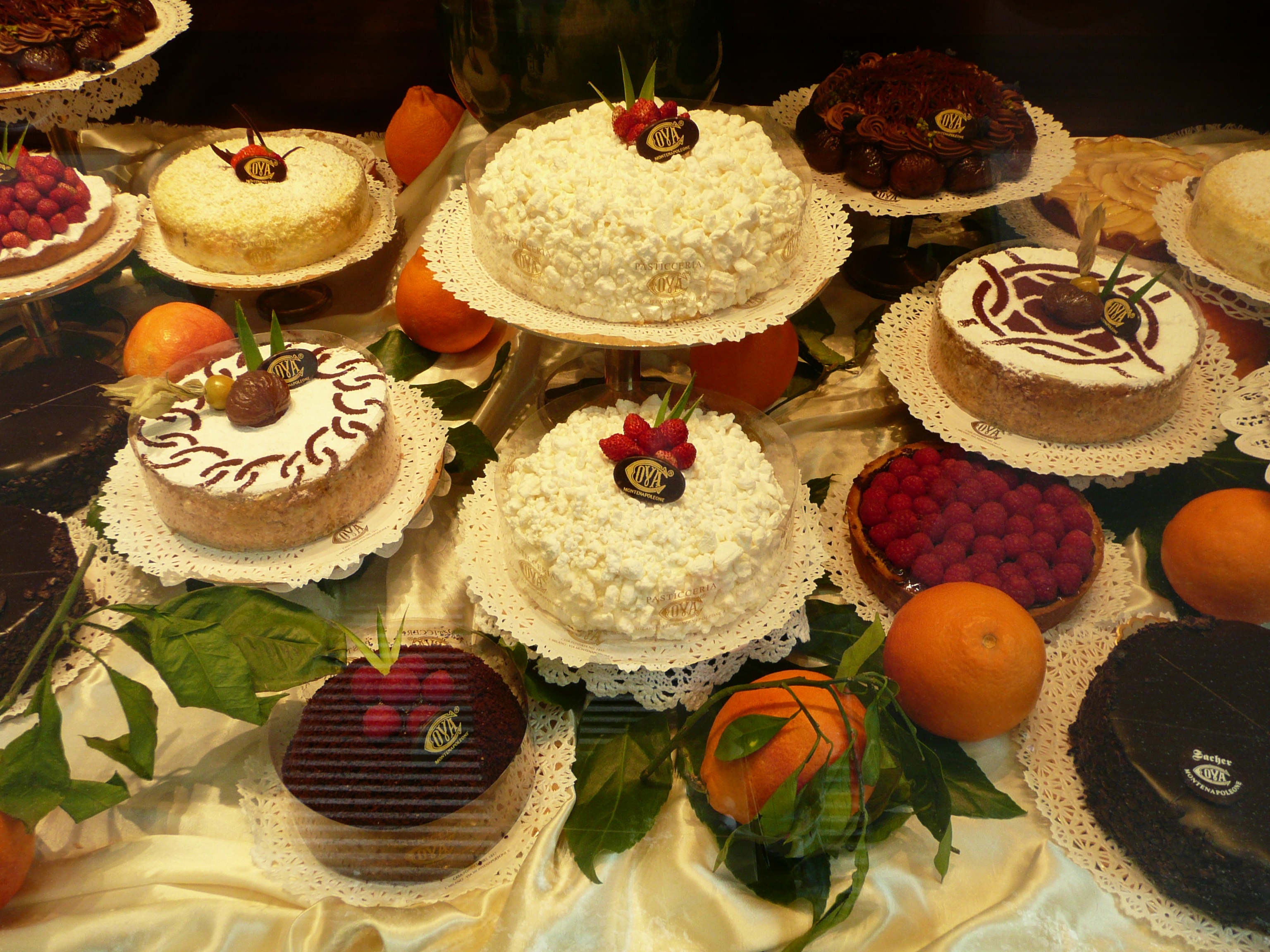 Pasticceria; Via Montenapoleone in Milano